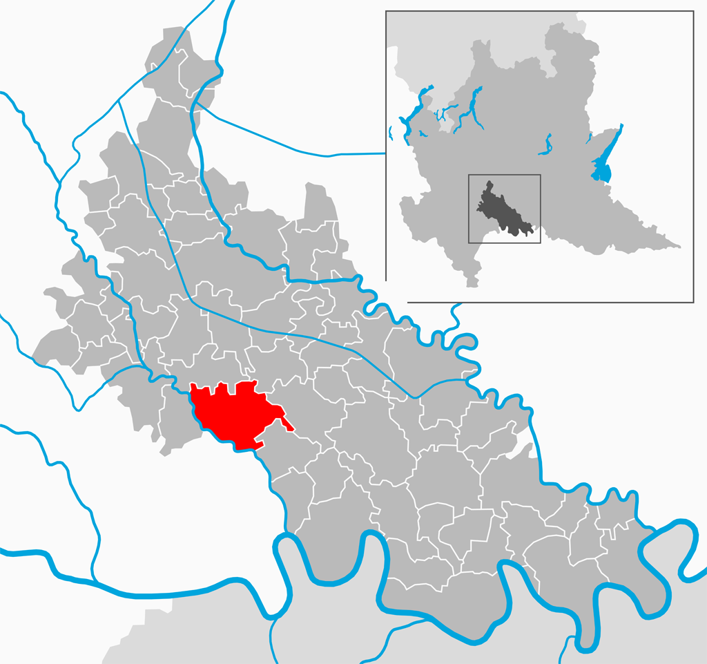 Il comune di Borghetto Lodigiano nella provincia di Lodi